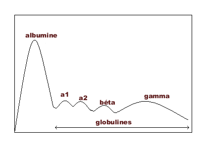 electrophorèse des proteines